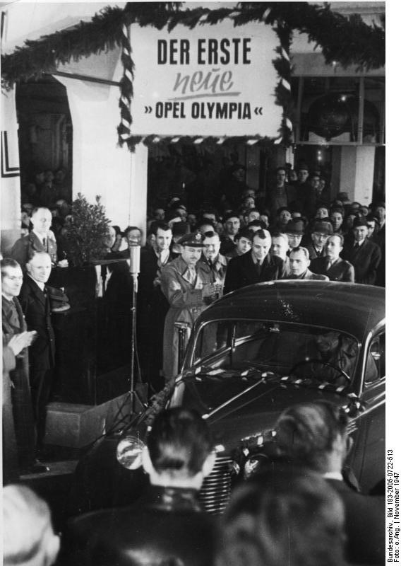 ADN-ZB/Illus-dpd Der Erste von hoffentlich sehr vielen. In den Rüsselsheimer Werken der Opel-Automobil-Werke lief der erste Wagen einer neuen Personenkraftwagenserie "Opel-Olympia" aus der Fabrik. Er stellt eine wesentliche Verbesserung gegenüber seinem Vorläufer dar. Neue technische Daten des 1,5 Liter Opel-Olympia 1947 sind ein Hubraum von 1488 Kubikzentimeter, 3500 Umdrehungen in der Minute und eine Leistung von 37 PS. Herausgabe: 1.12.47, 1007-47